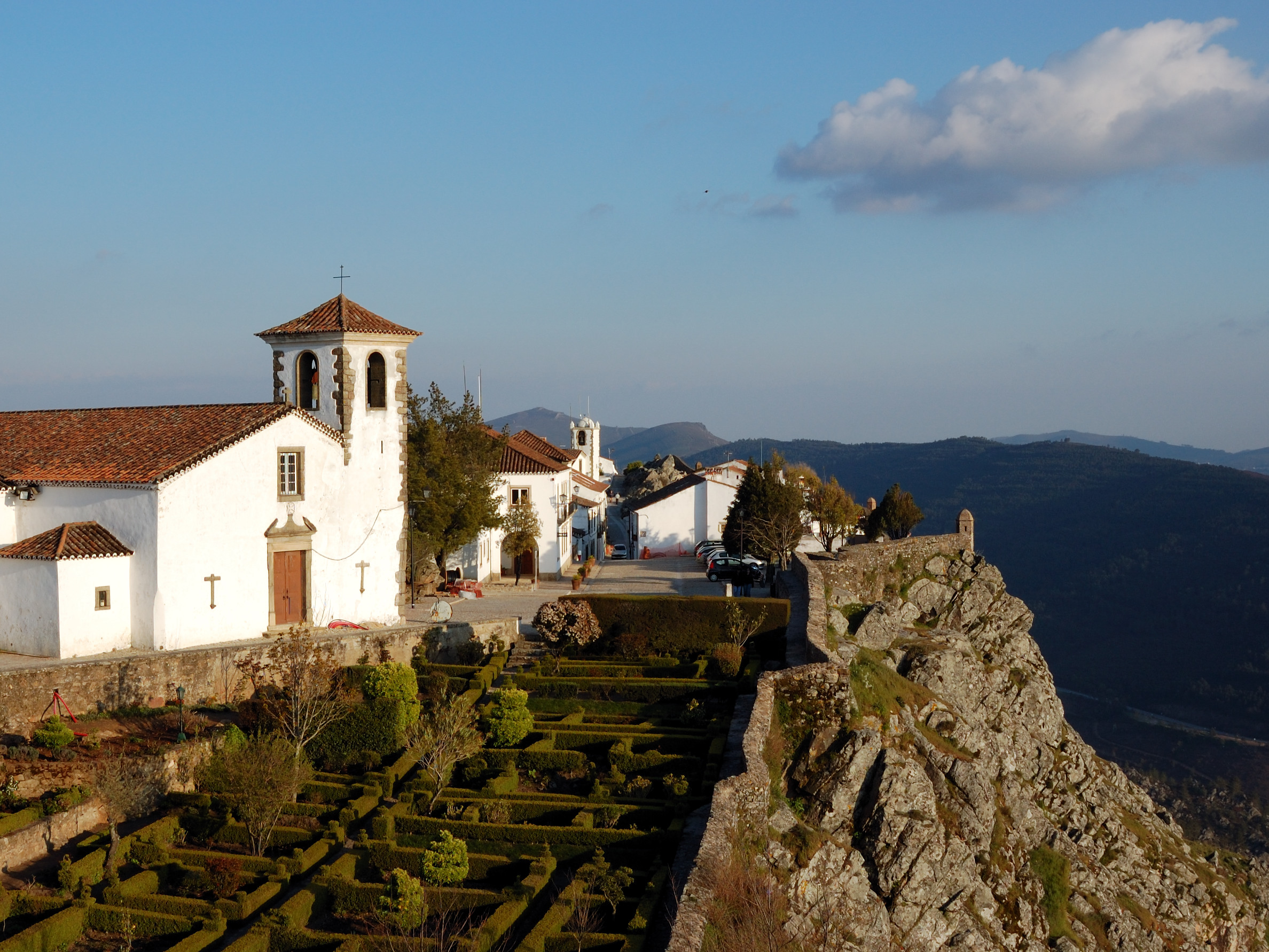 View of Marvão, Portugal